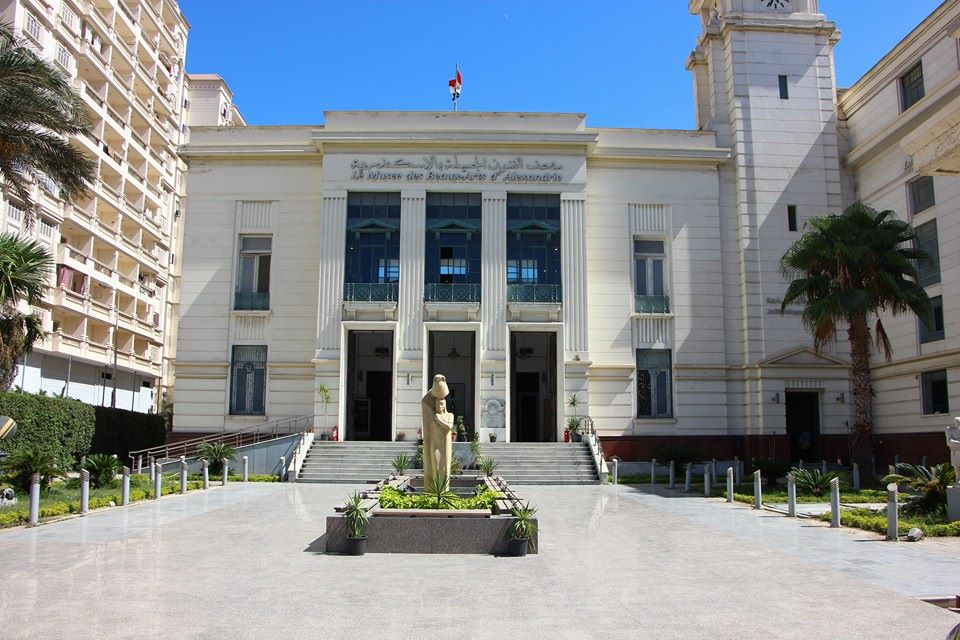 صورة كاملة للمجمع الفني